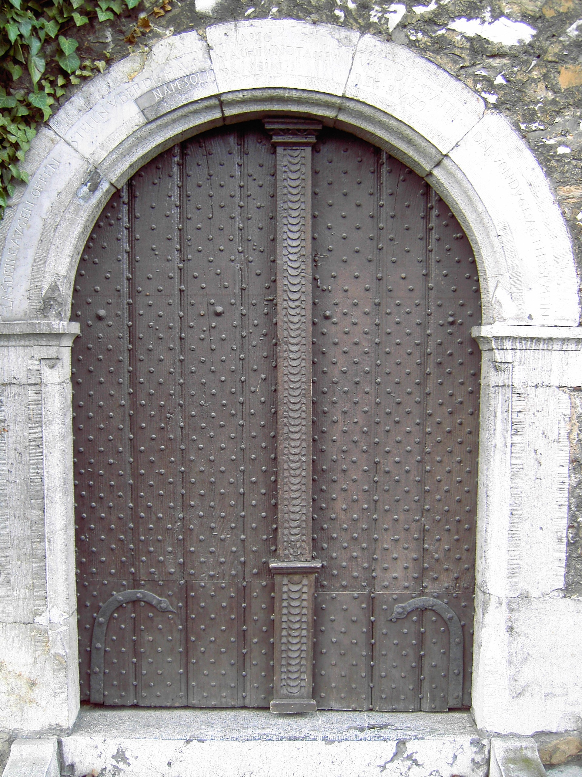 Eingangstor der Vogelsangkirche in Stolberg /Rhld.